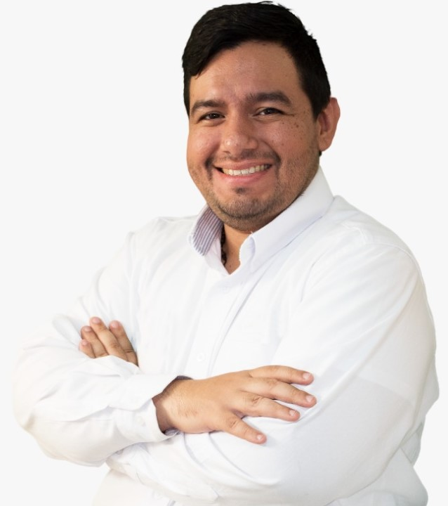 Imagen de perfil de Yamil Lima fotografía tomada en Agosto de 2019